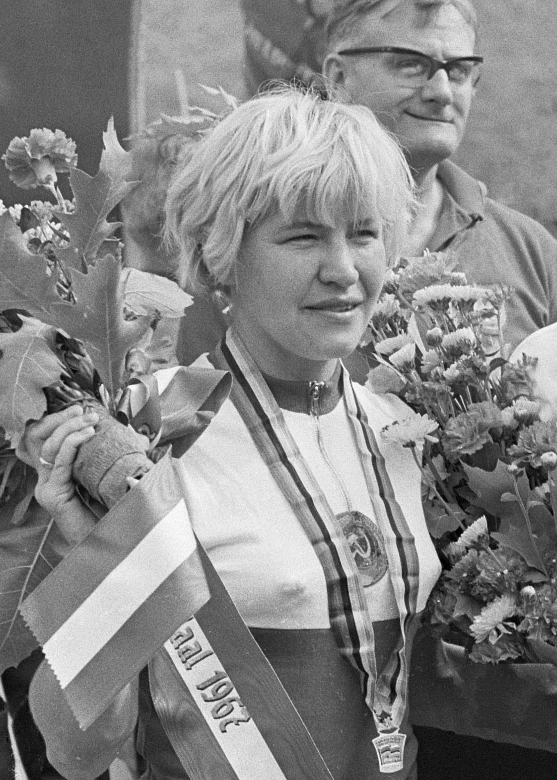 WK Wielrennen, Lyubov Zadorozhnaya